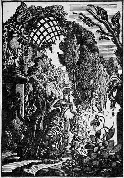 Алексей Ильич Кравченко. Иллюстрация к повести Э.Т.А.Гофмана «Повелитель блох». 1922. Ксилография. Издано: Э.Т.А.Гофман. «Повелитель блох». М.: Academia, 1929. Meister Floh